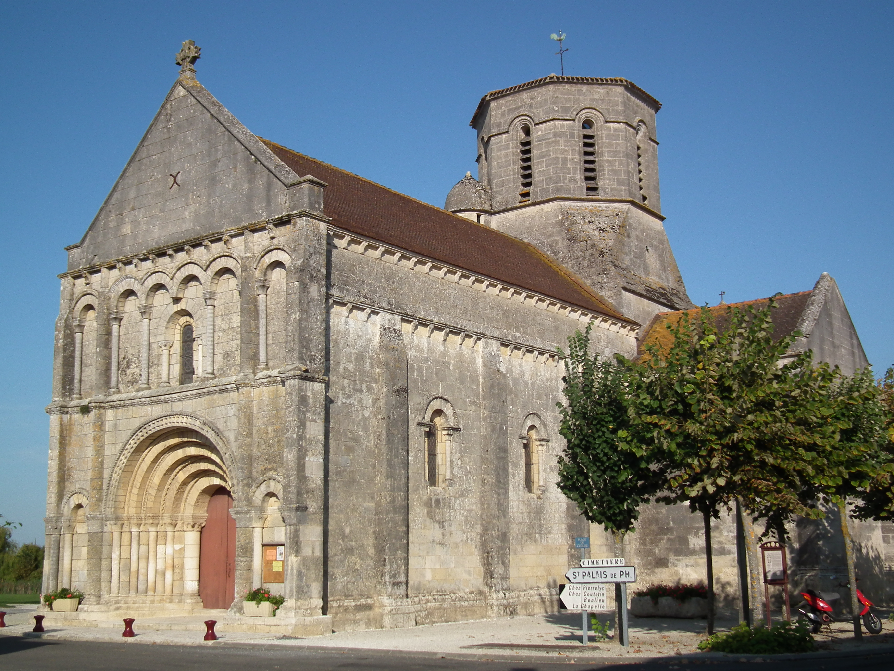 L'église romane de Bois